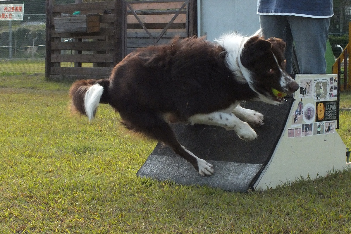 FLAYBALL-TURN